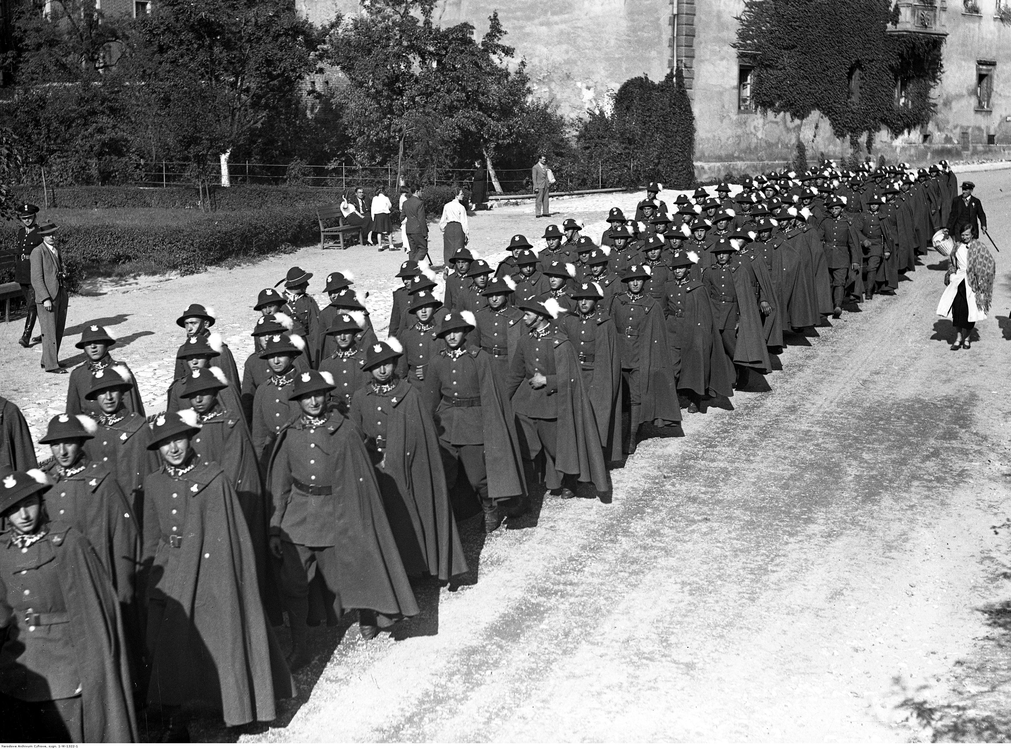 Wizyta 5 Pułku Strzelców Podhalańskich w Krakowie - pułk w marszu. Koncern Ilustrowany Kurier Codzienny - Archiwum Ilustracji. Sygnatura: 1-W-1322-1